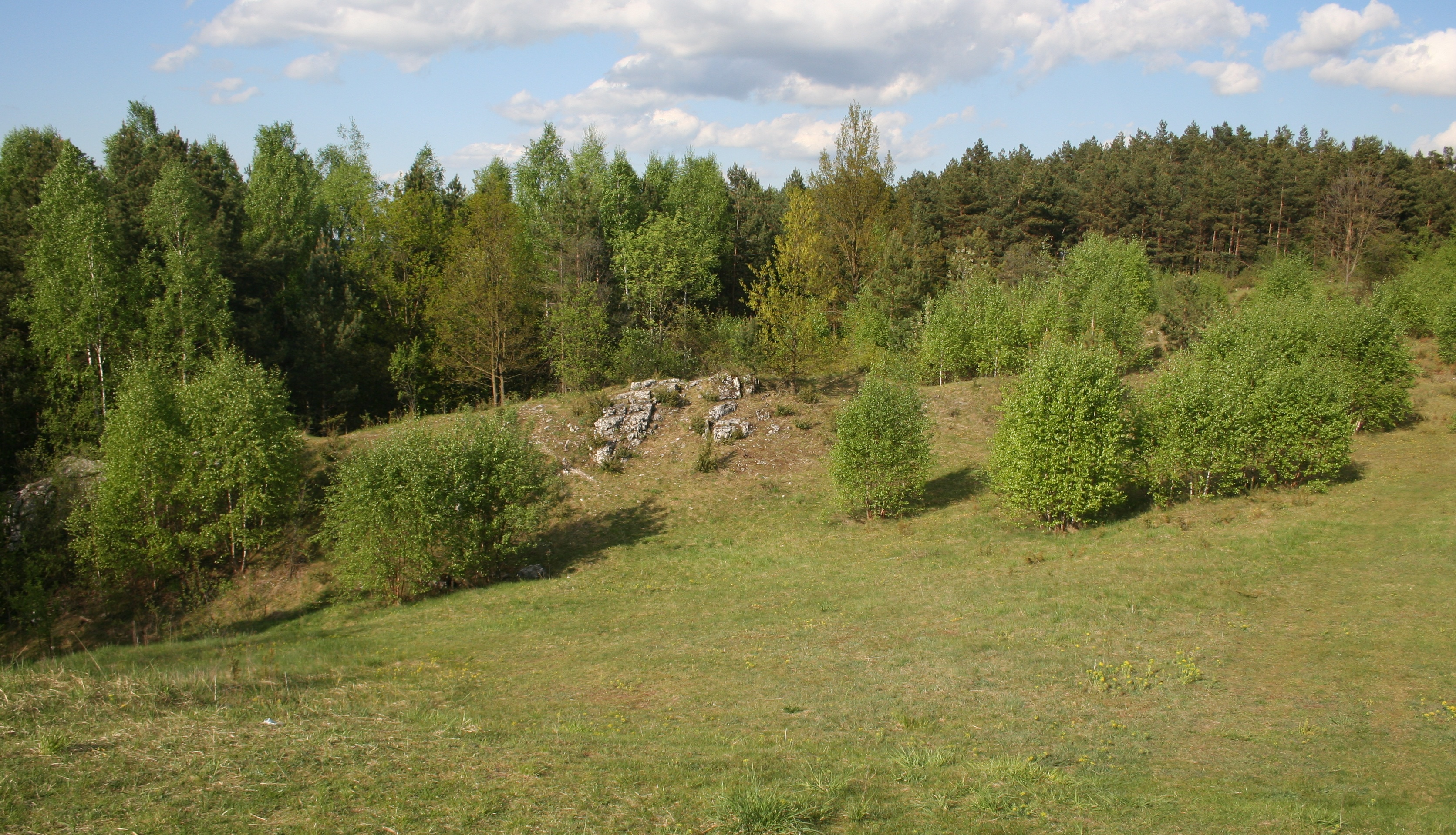 Załęczański PK, Rezerwat Węże - płaskowyż na górze Zelce